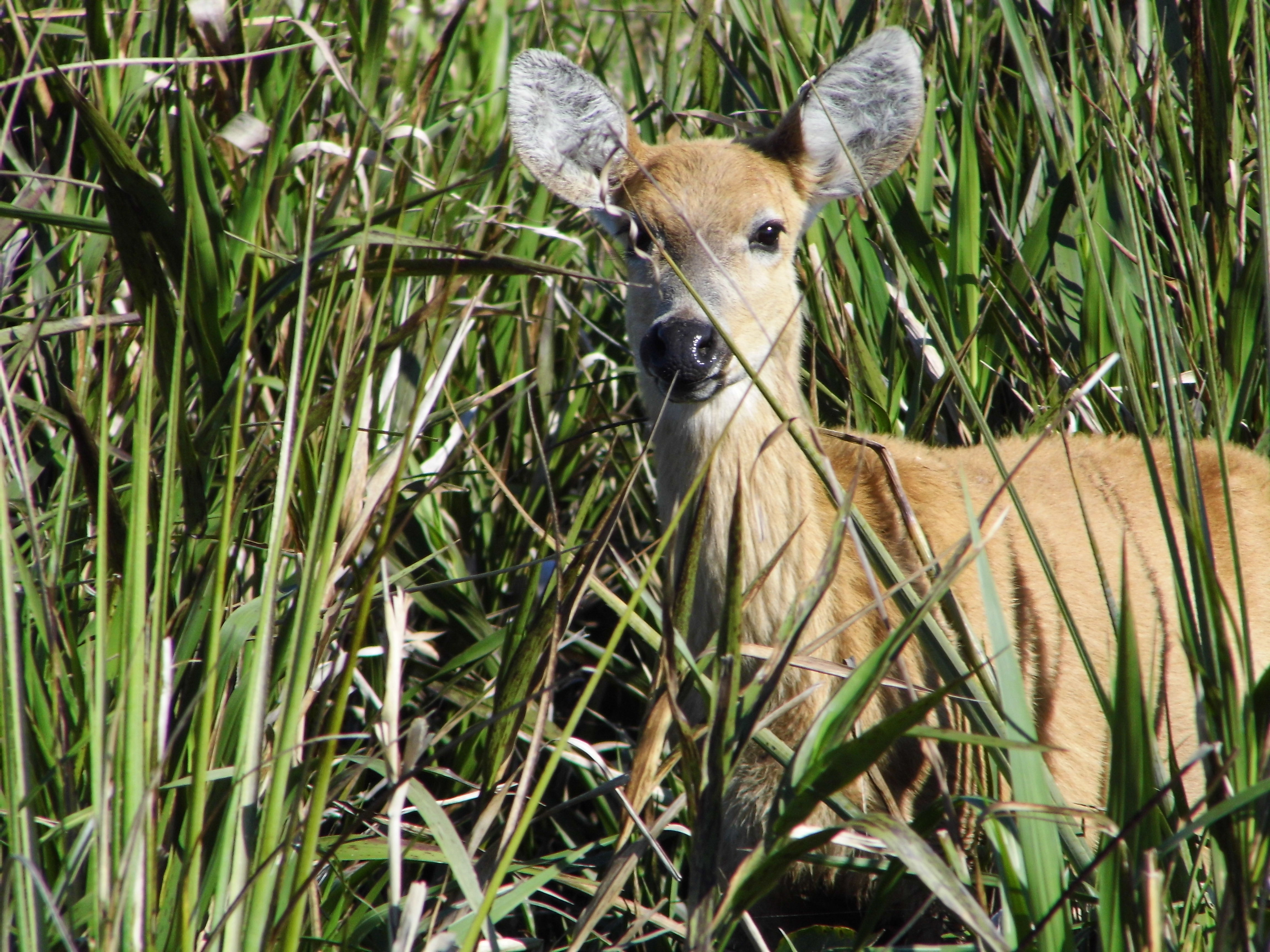 Esteros del Iberá